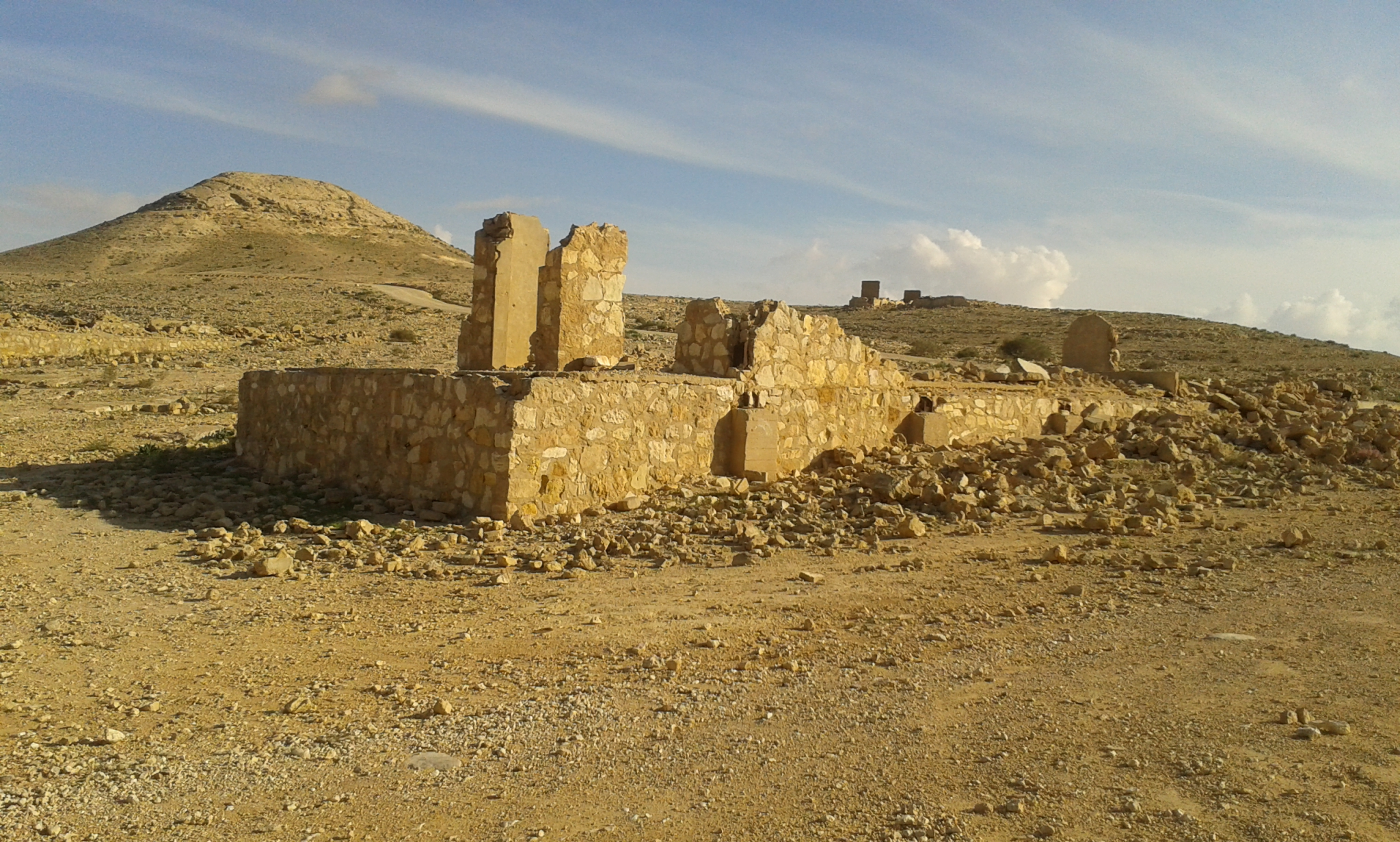 מחנה קידוחי הנפט לייד הר אבנון